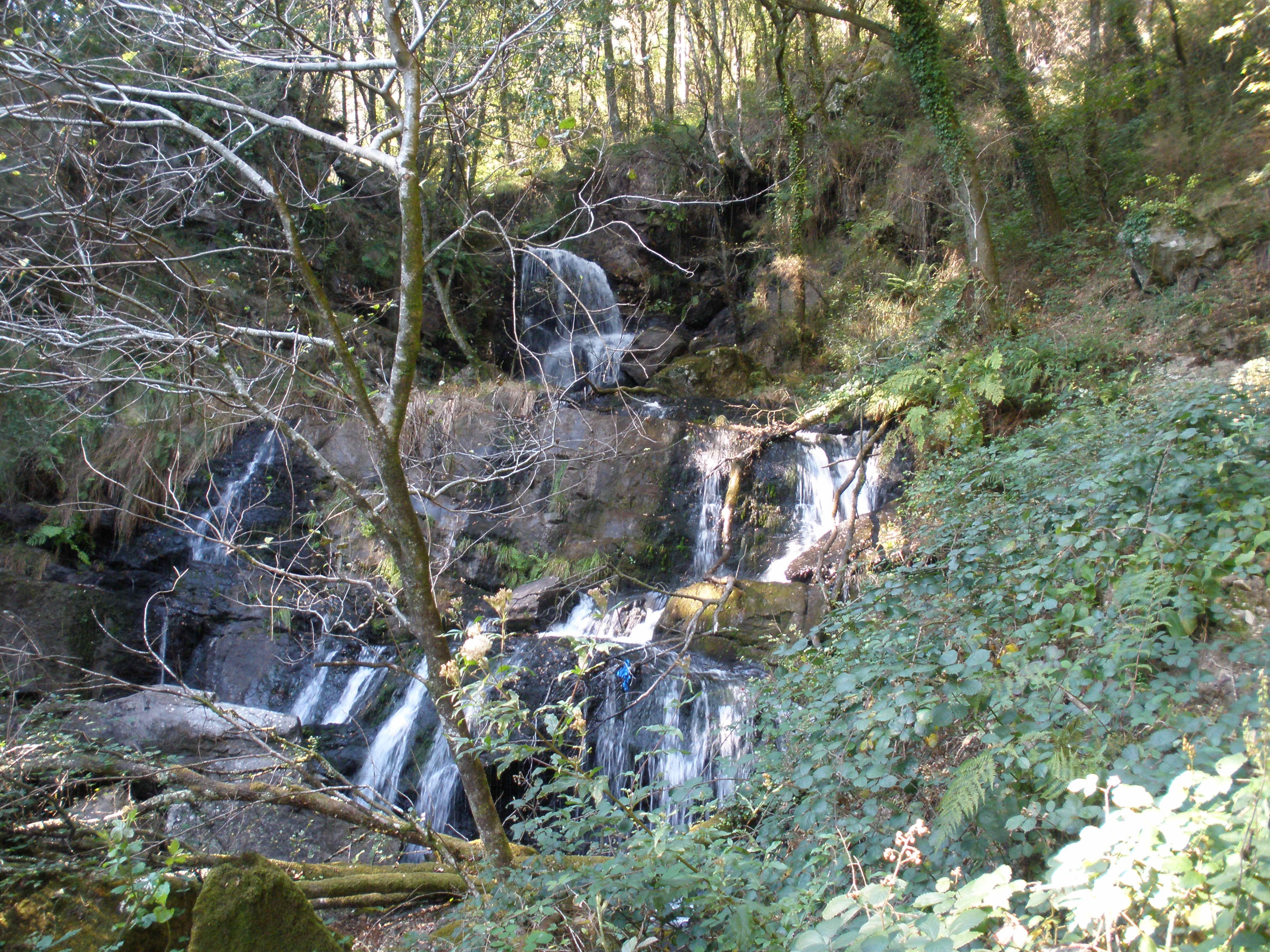 Fervenza O Rexedoiro